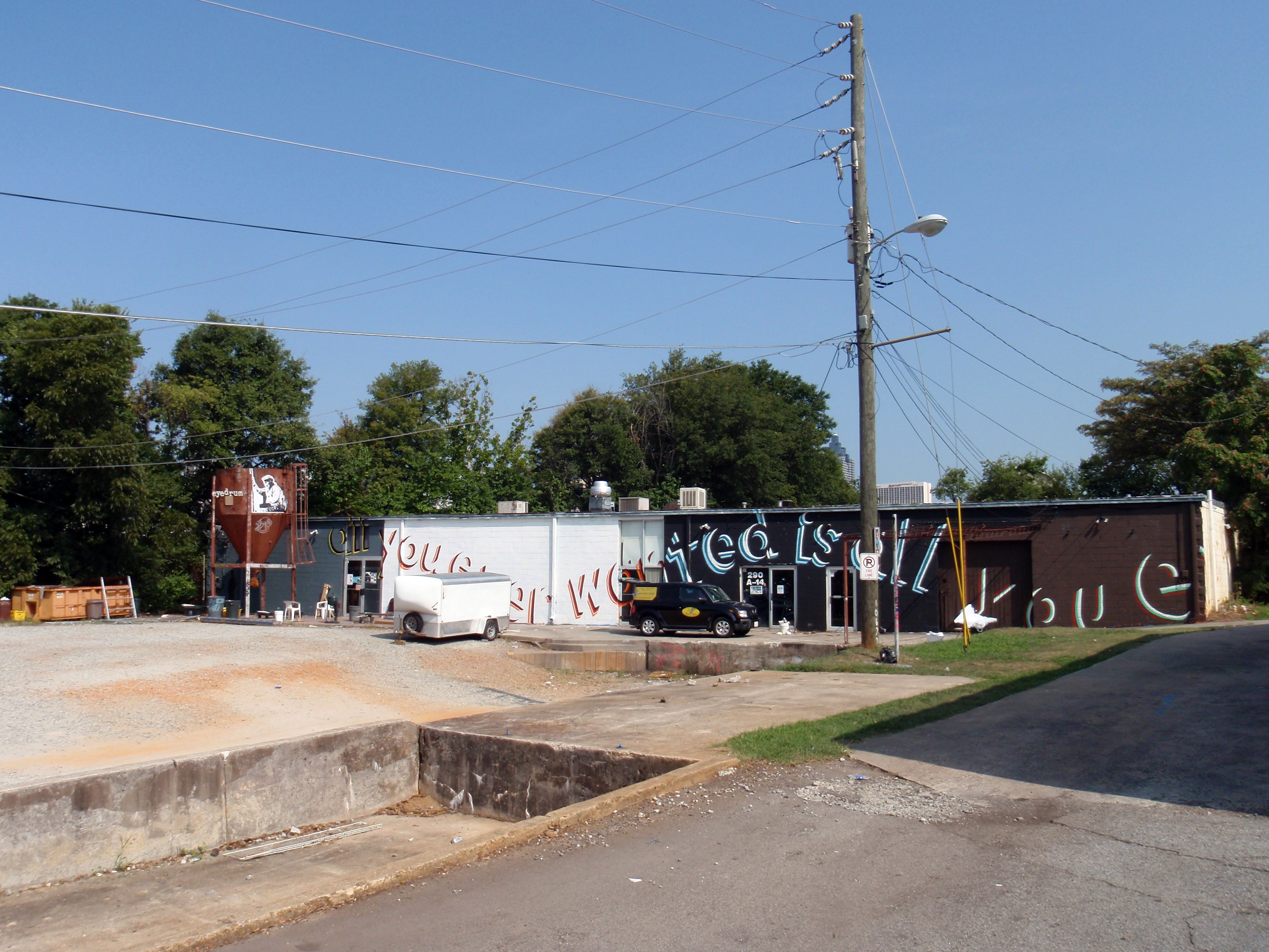 Eyedrum, Atlanta